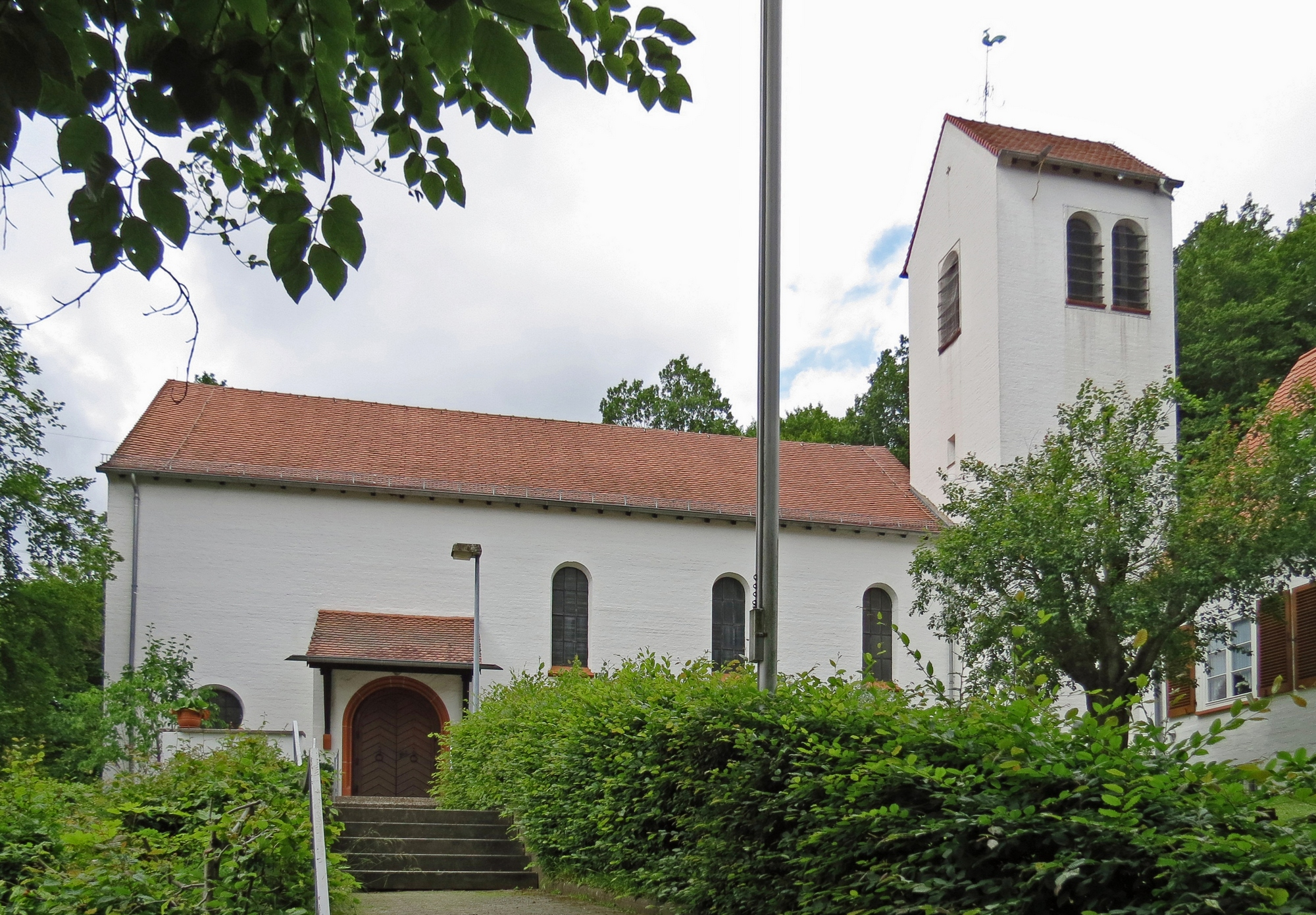 ev. Pfarrkirche, Fischbachstraße, Rußhütte, Saarbrücken.